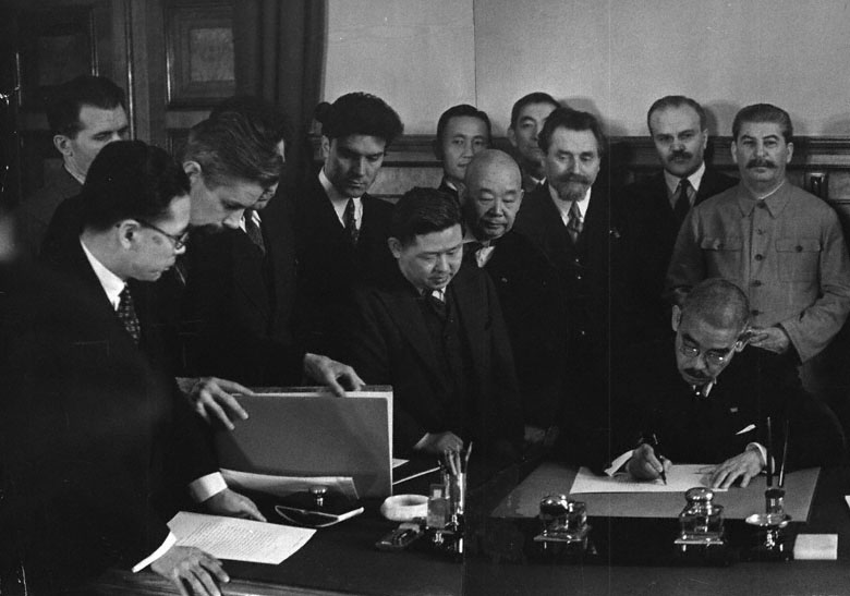 Министр иностранных дел Японии И. Мацуока подписывает Пакт о нейтралитете между СССР и Японией. Присутствуют: И.В.Сталин, нарком иностранных дел СССР В. Молотов, зам. наркома иностранных дел СССР С.А.Лозовский